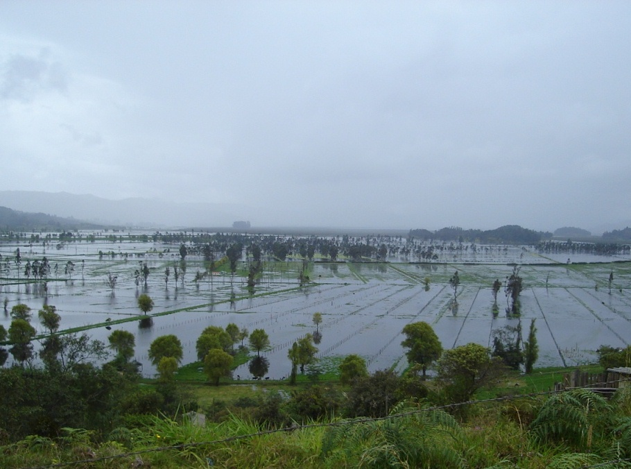 Inundación de 2006 de la Laguna de Fúquene, en Cundinamarca, Colombia